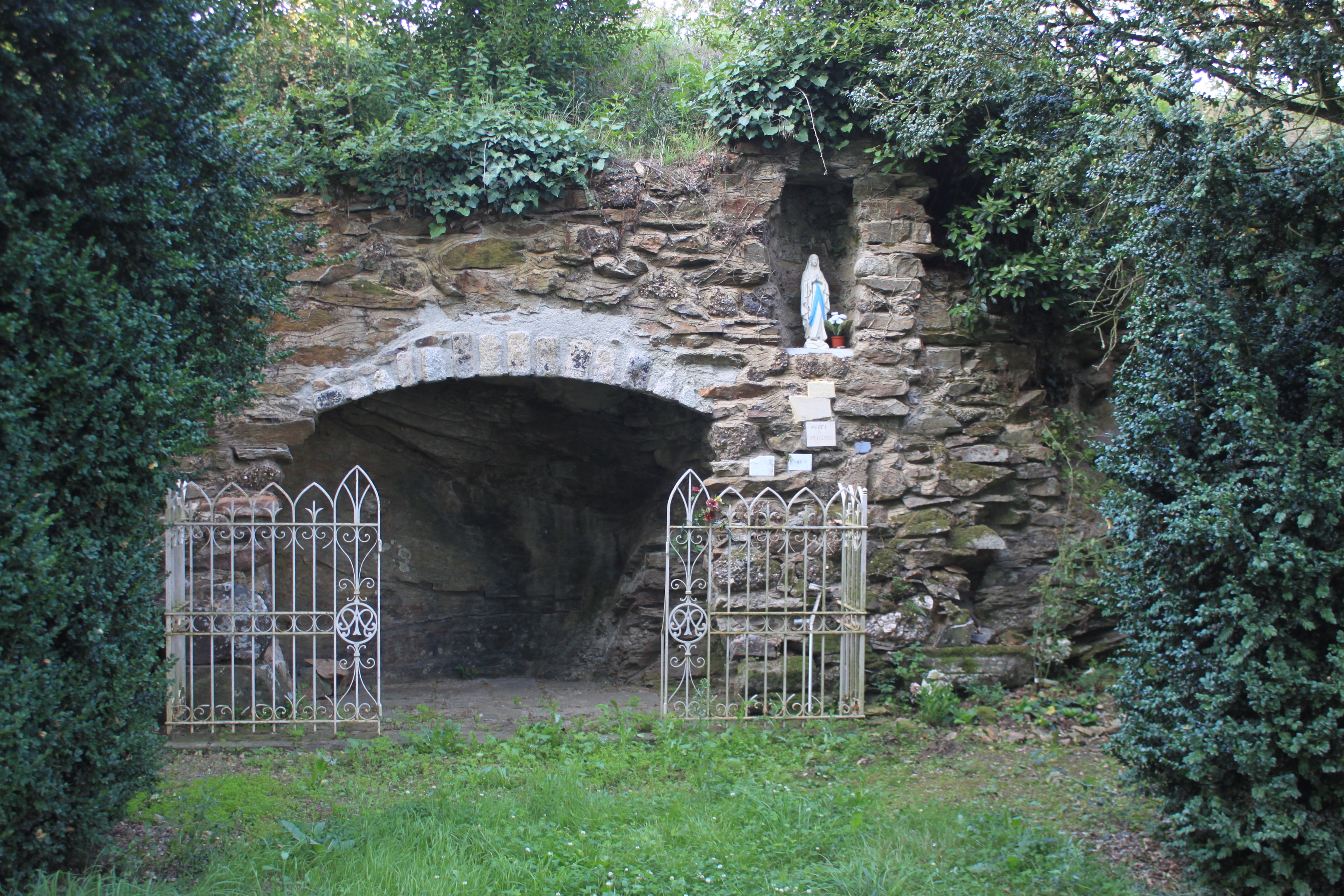 Réplique de grotte de Lourdes, Fr-85-Saint-Philbert-de-Bouaine.